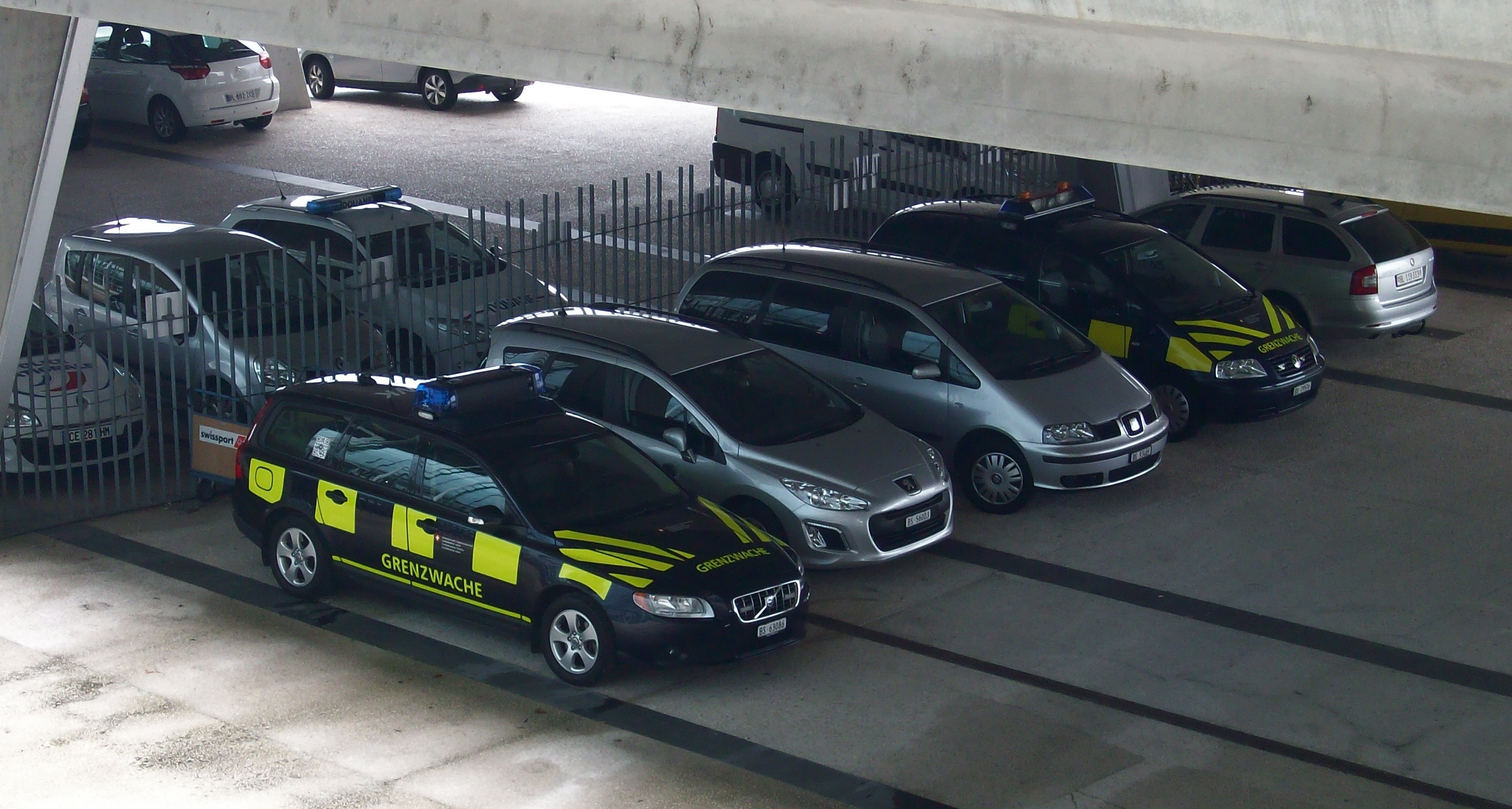 Véhicules "Grenzwache", côté Suisse de l'EuroAiport